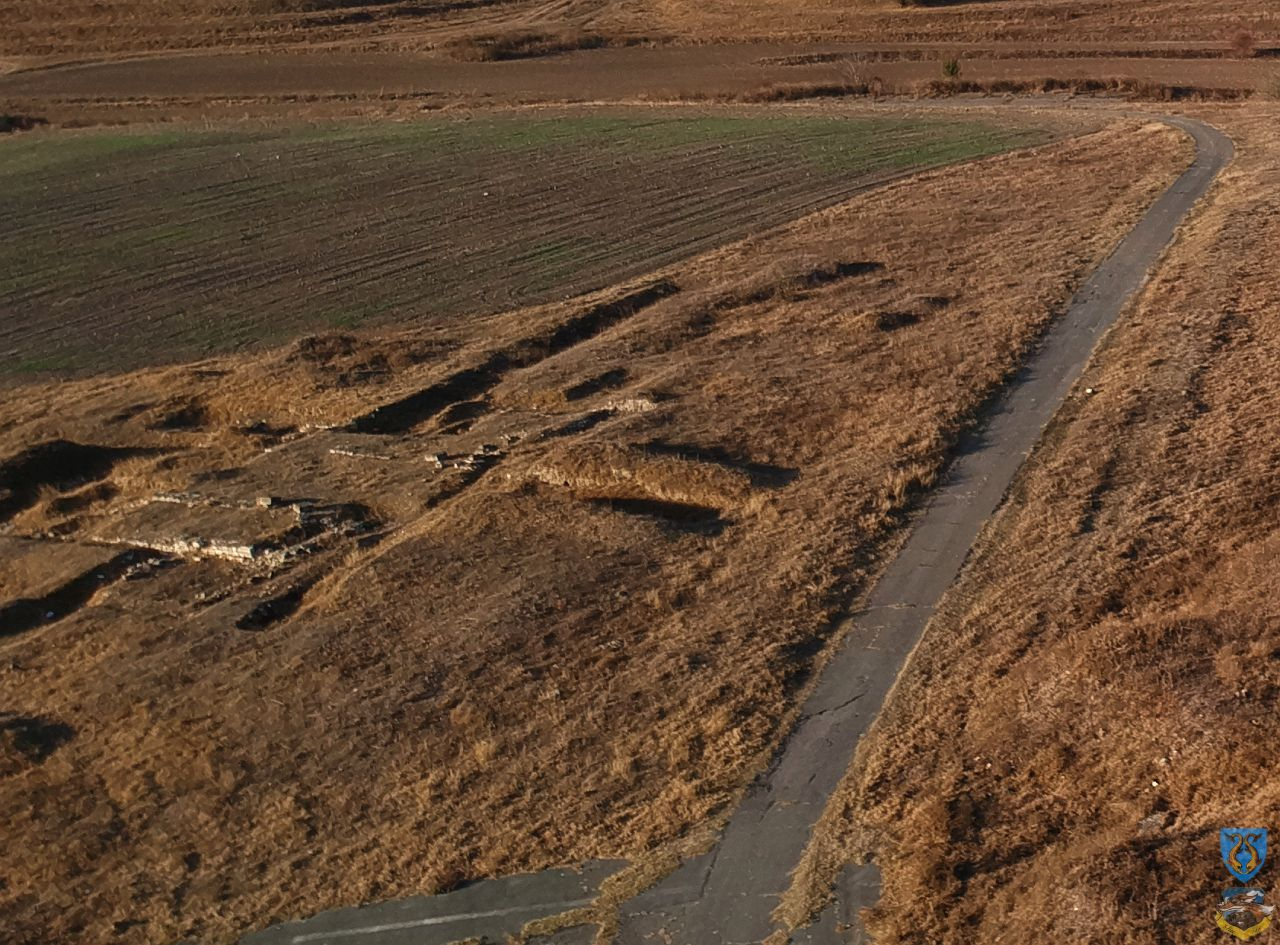 Termele cetății Tropaeum Traiani 08